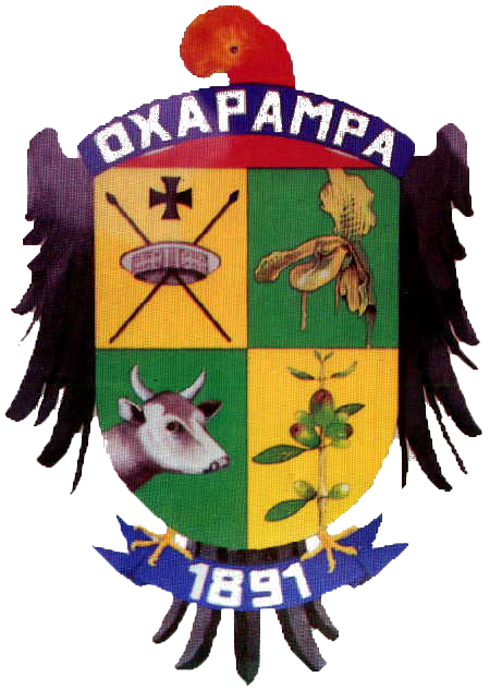 Escudo de la Provincia de Oxapampa.